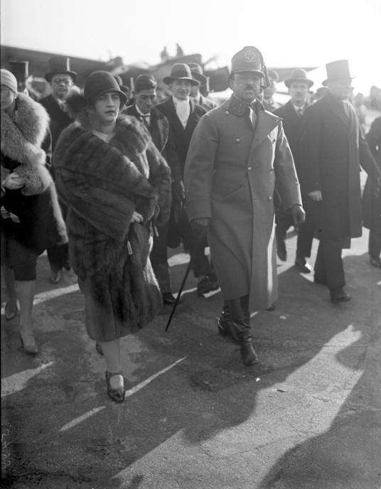 Der Königs Aman Ullah von Afghanistan besichtigt den Centralflughafen in Berlin-Tempelhof! Der König und die Königin bei der Besichtigung des Flughafens.